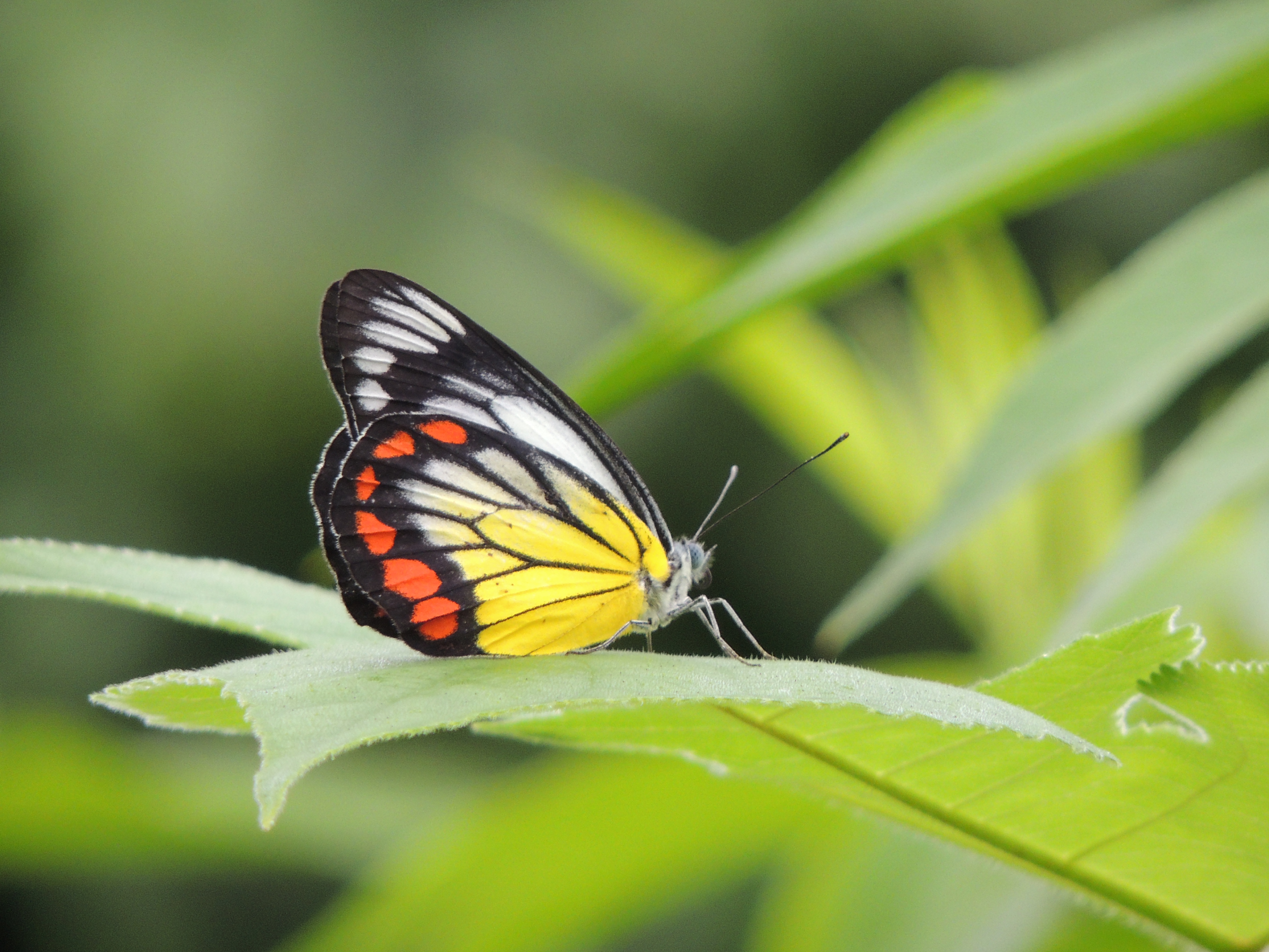 107紅紋粉蝶2(劉威良攝)